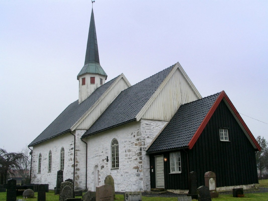 Våler kirke og del av kirkegården sett fra nordøst